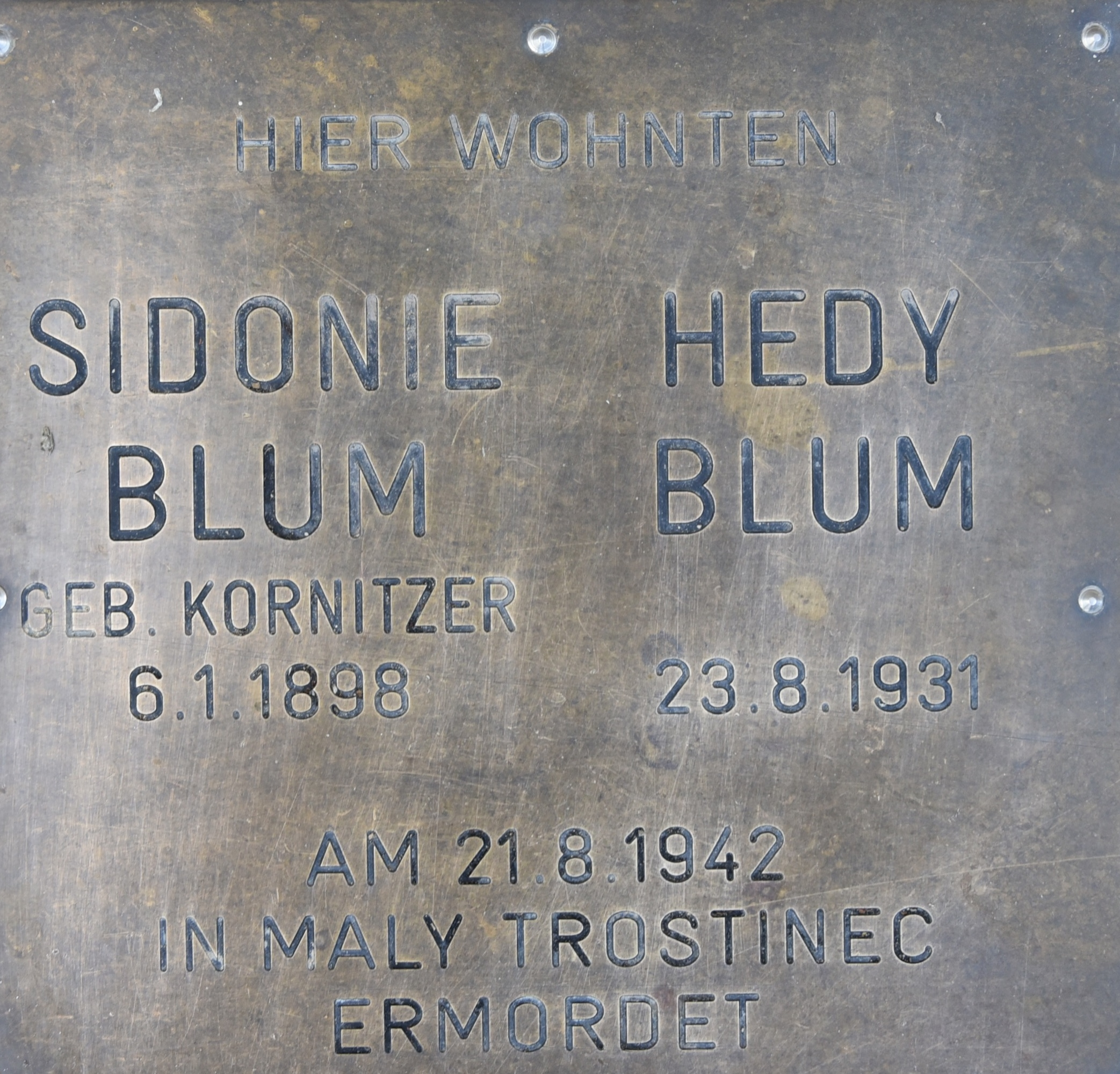 Steine der Erinnerung Wien-Liesing, Sidonie und Hedy Blum, Breitenfurter Straße 316, 1230 Wien